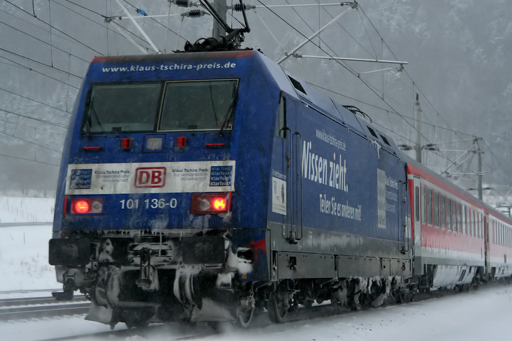 Lok der BR 101 mit Werbung für den Klaus-Tschira-Preis